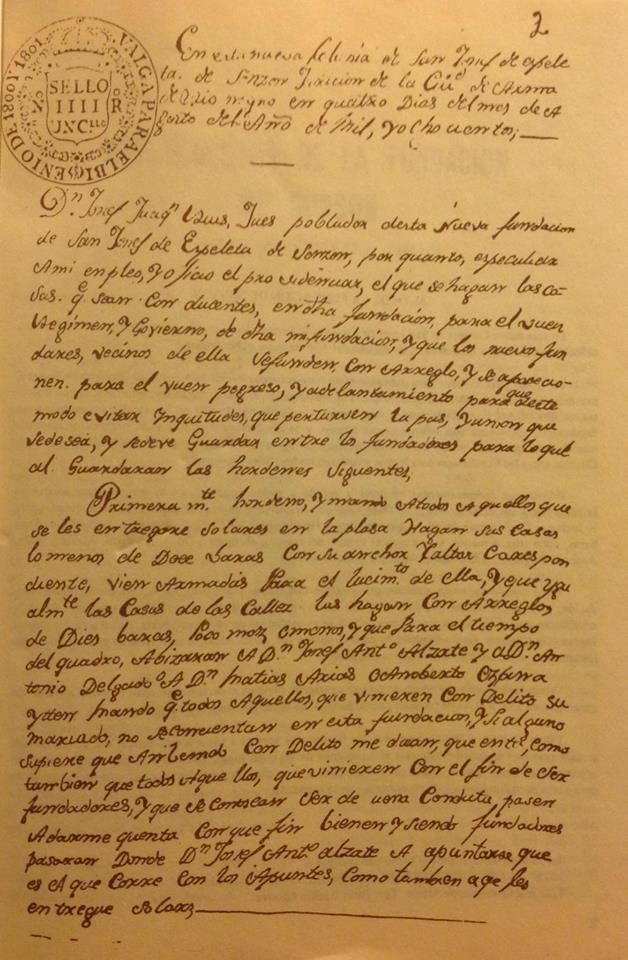 Texto original acerca de la fundación del municipio.